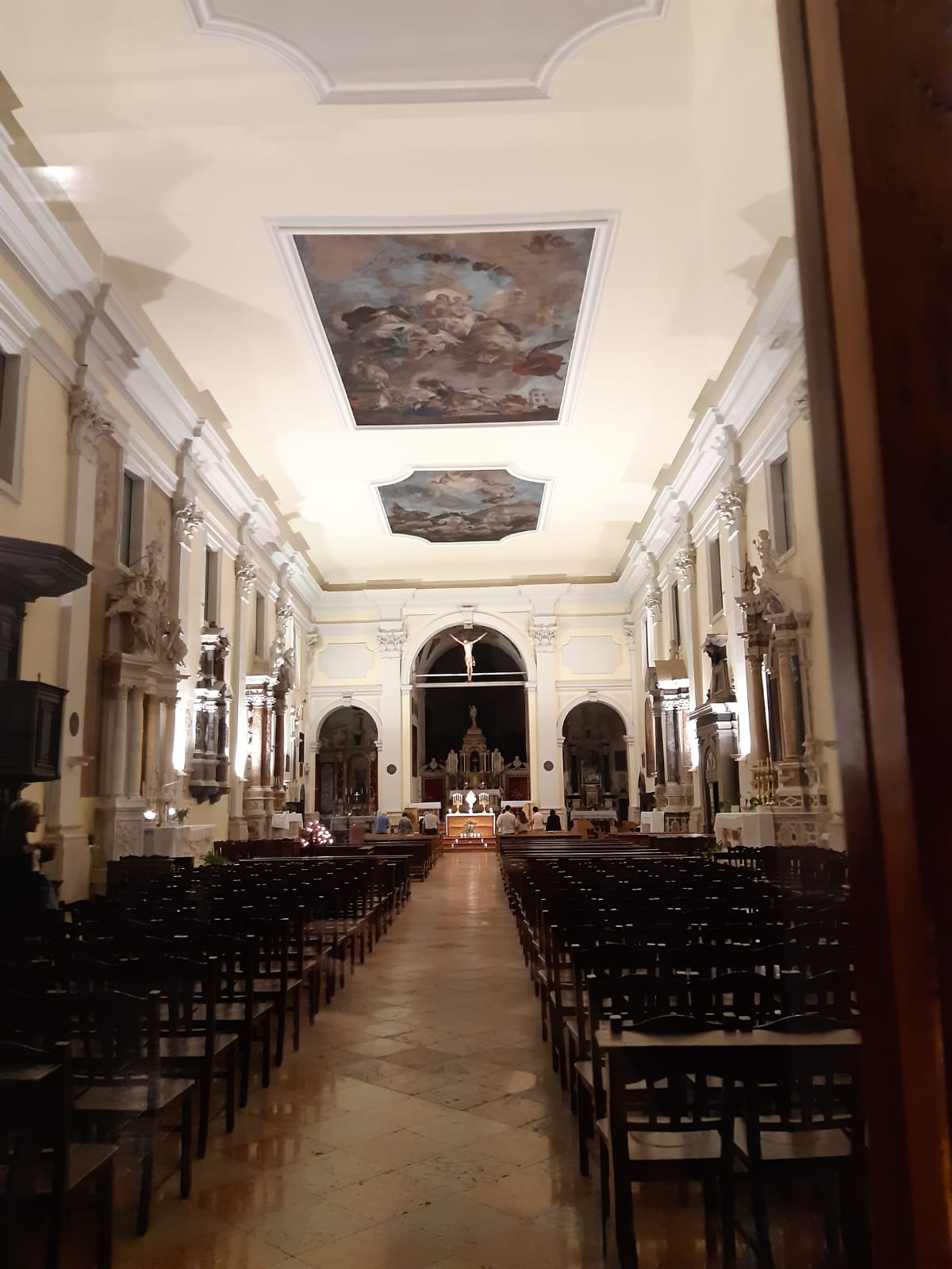 L'interno della chiesa di San Pietro Martire ad Udine il 31/08/2019